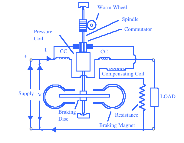 جهاز قياس التيار اليوطومسون